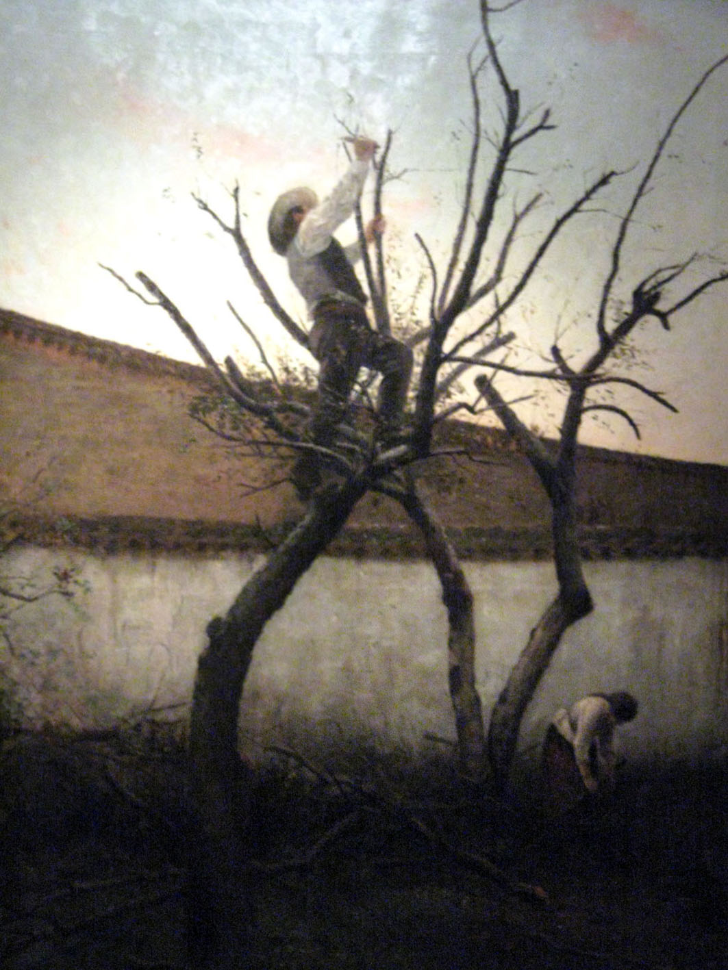 Pintura "La Poda" Casa del Arte Native namePinacoteca de la Universidad de Concepción Casa del Arte de la Universidad de Concepción Casa del Arte José Clemente OrozcoLocationConcepción, ChileEstablished1967WebsitePinacoteca de la Universidad de Concepción